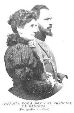 La infanta Doña Paz y el Príncipe de Baviera. Fotografía de Christian Franzen.